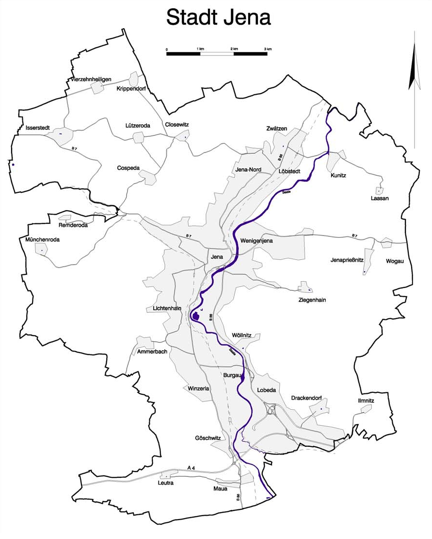 Stadtteile der Stadt Jena